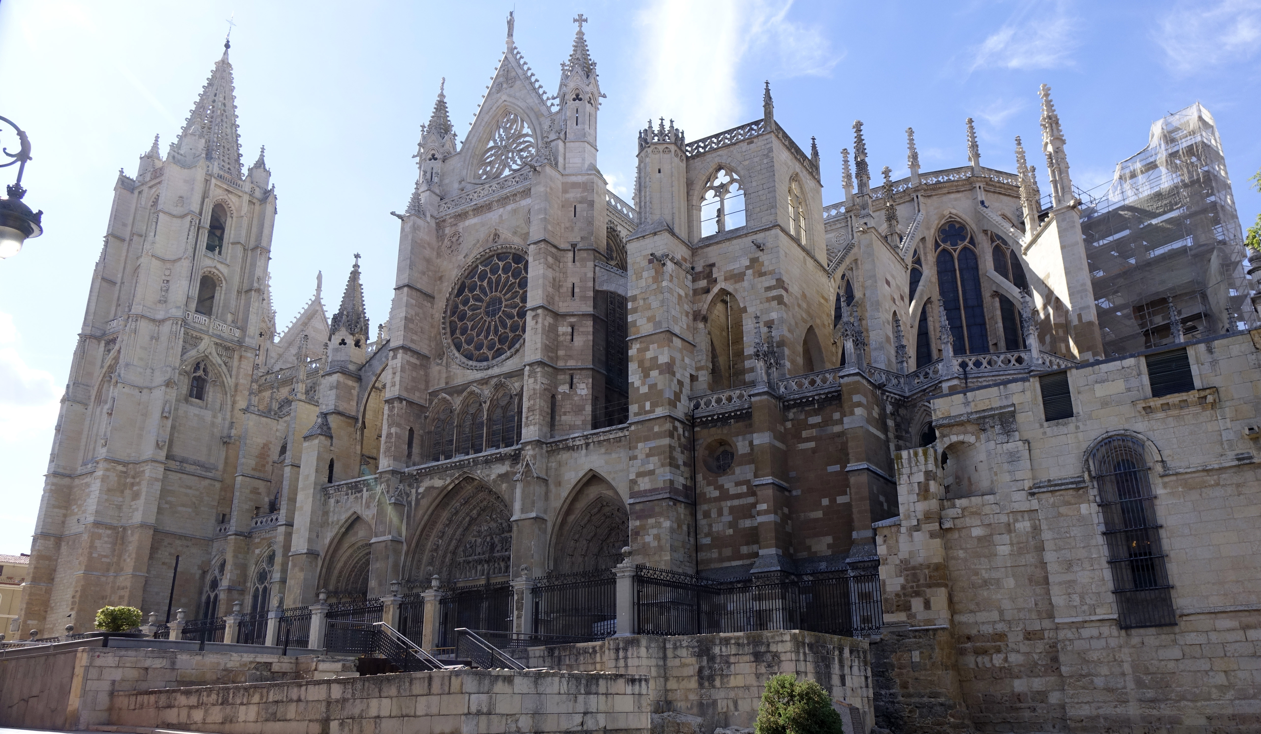 El costado sur de la catedral de León, desde Puerta Obispo.